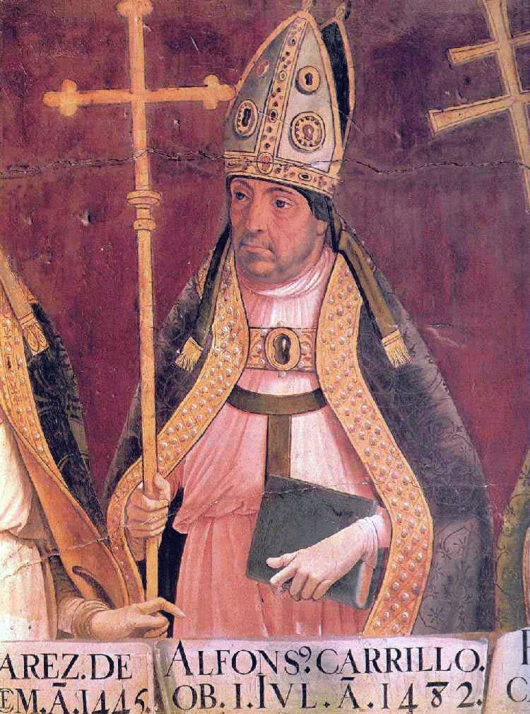 Pintura mural del arzobispo Alonso Carrillo de Acuña. c. 1508 Gemälde des Erbischofs von Toledo Alfonso Carrillo de Acuña